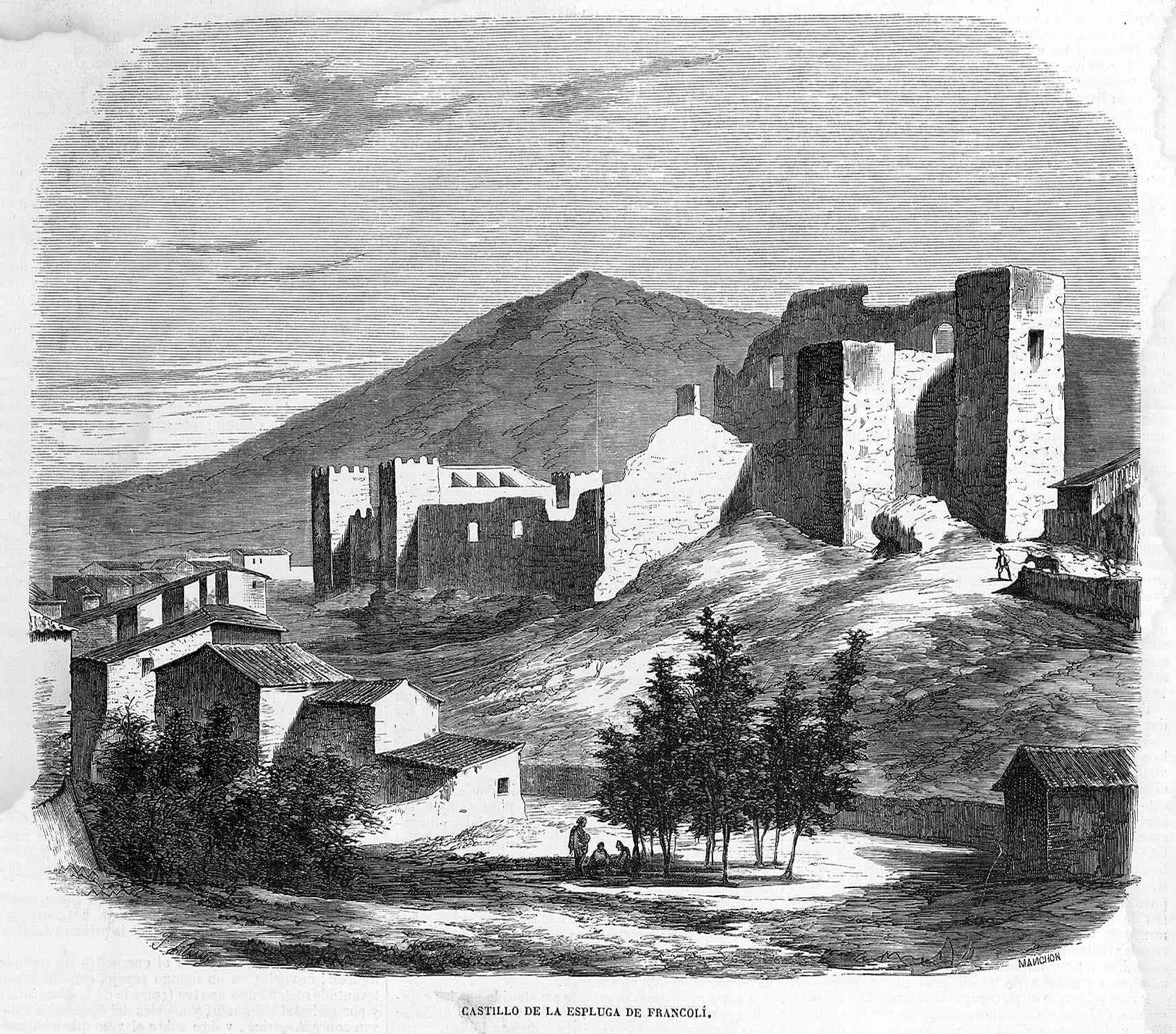 «Castillo de la Espluga de Francolí», en la revista española El Museo Universal.